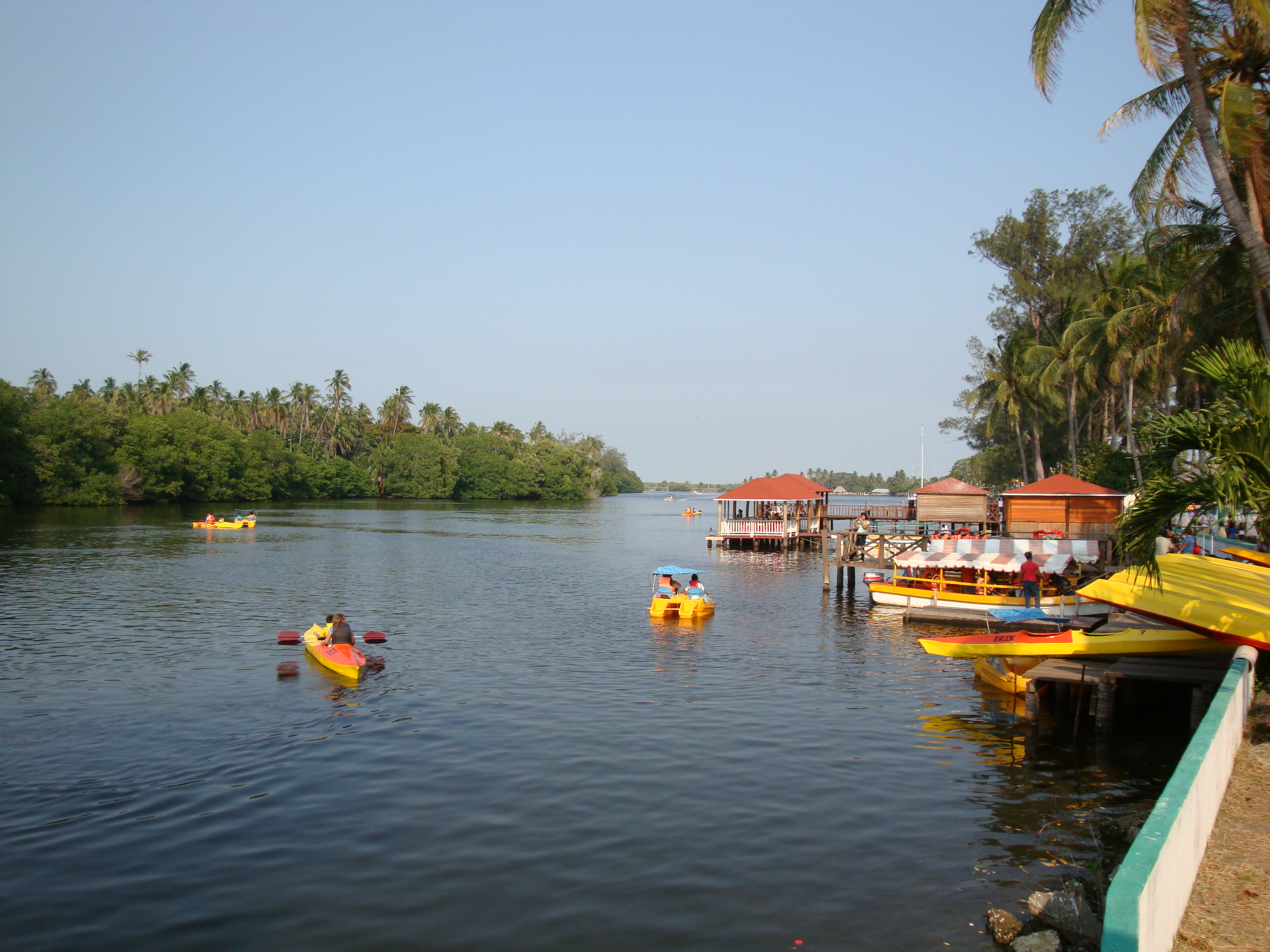 Renta de kayak's en el centro turístico Puerto Ceiba, Paraíso, Tabasco.